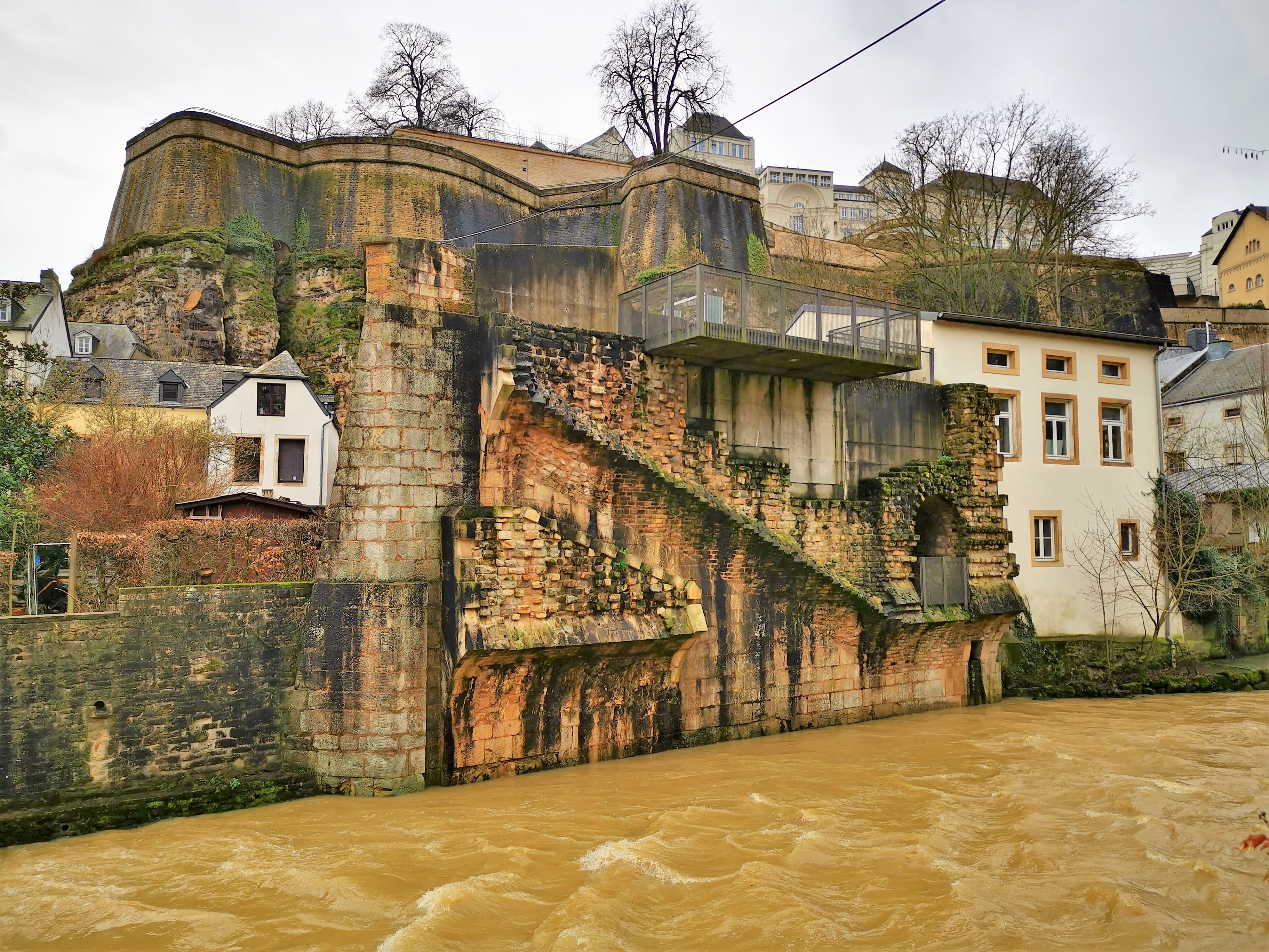 Luxembourg-Grund, vestiges de l'écluse du Grund, rive gauche.